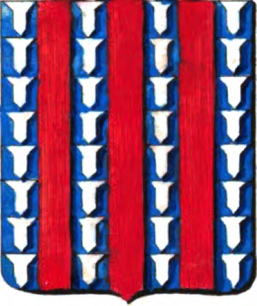 Vairé d'argent et d'azur, à trois pals de gueules.